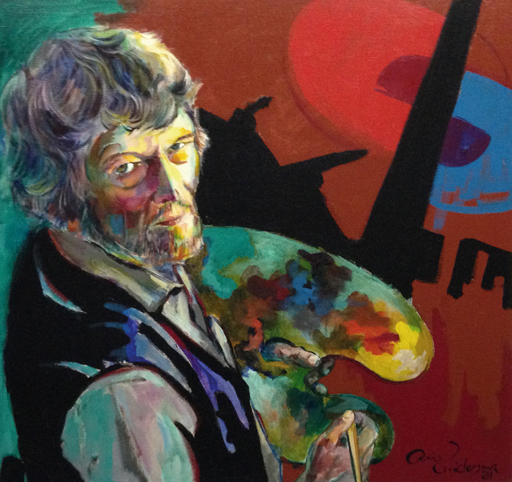 Een geschilderd zelfportret door Arie Zuidersma